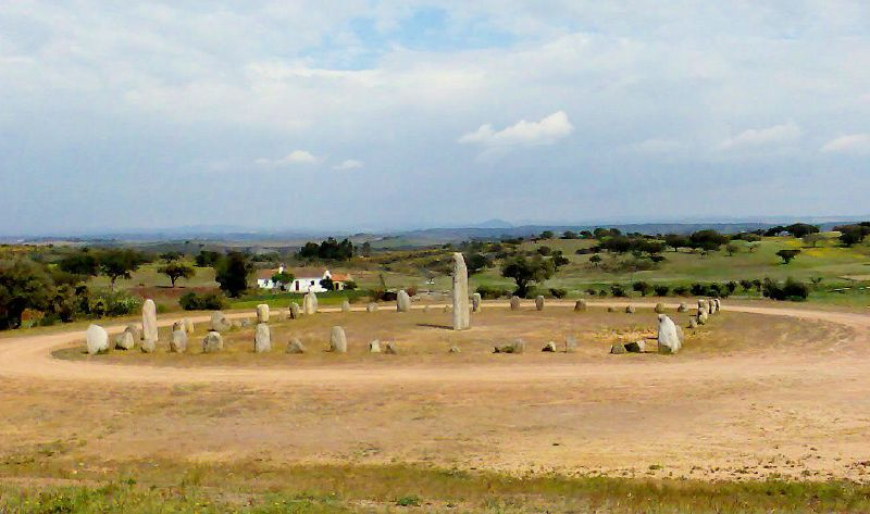 Portugal Monsaraz Cromeleque Menir